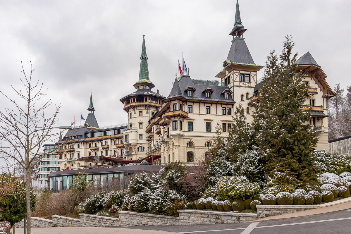 Dolder Grand Hotel in Zürich